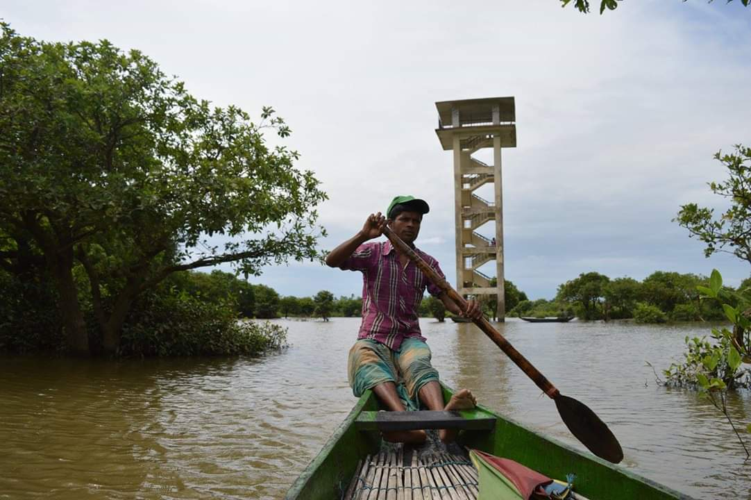 রাতারগুল জলাবন